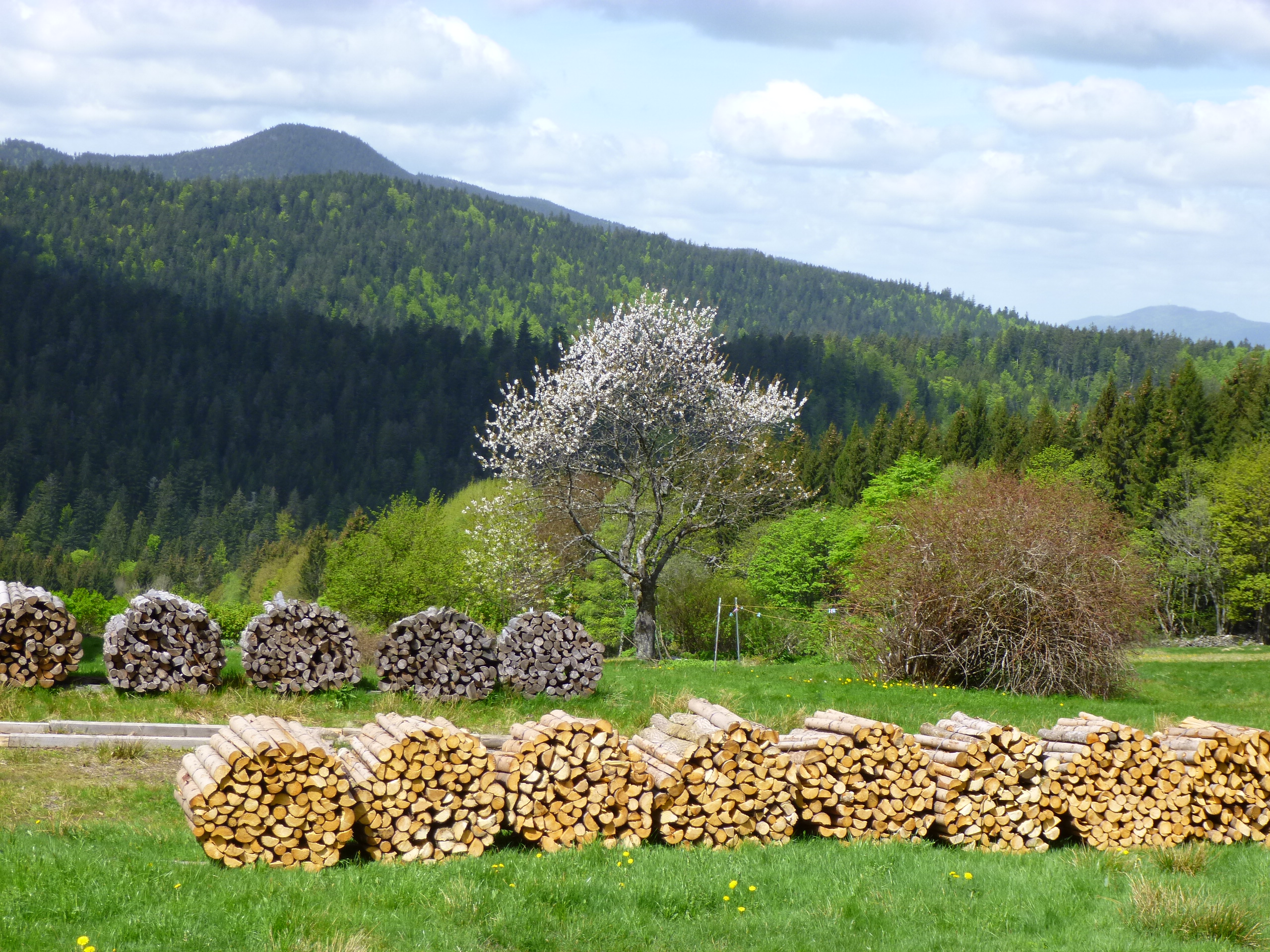 Blick von der Mooshütte beim Kleinen Arbersee.